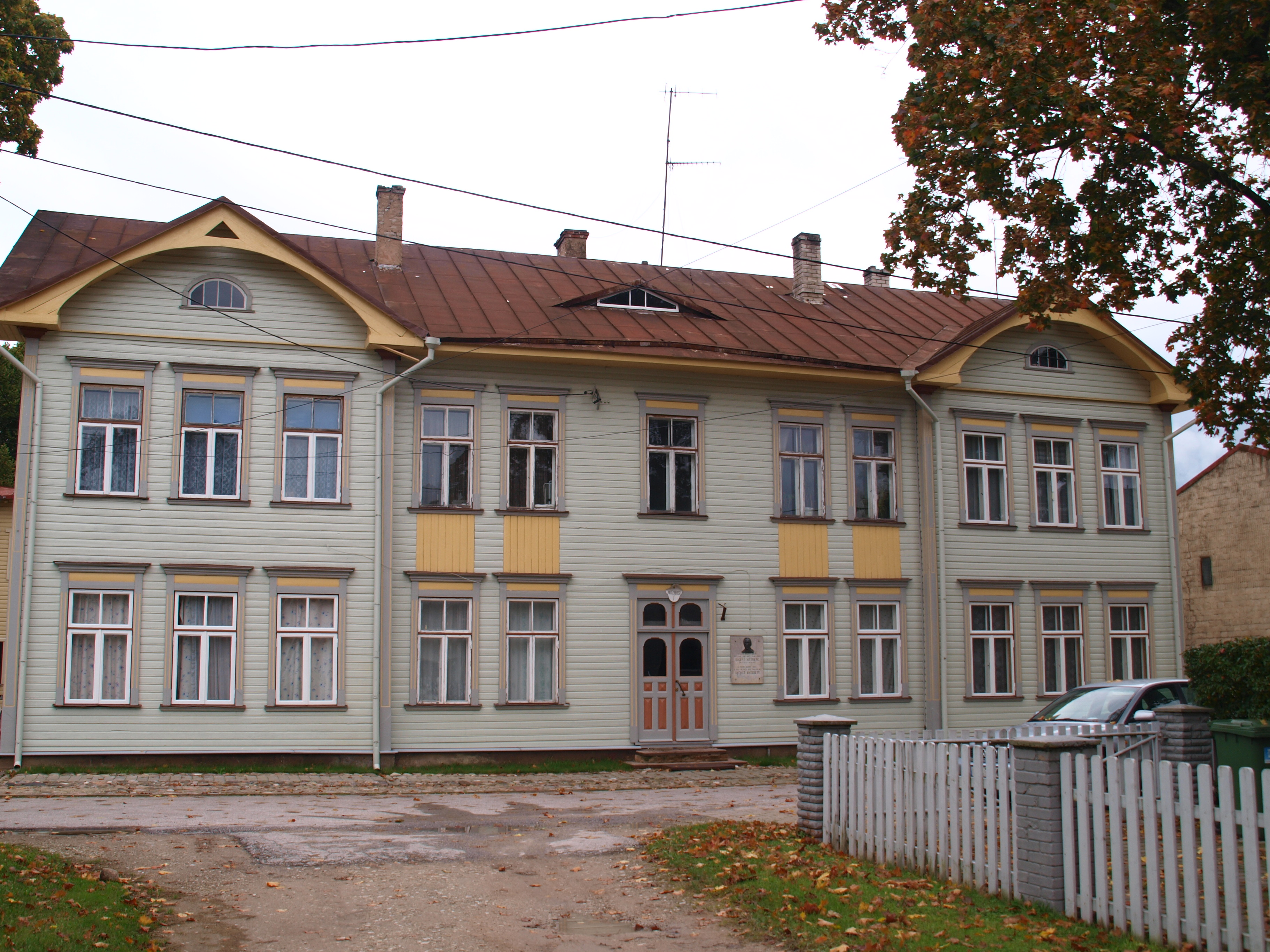 Puitelamu 1907-1914, kus aastail 1912-1927 elas August Kitzberg